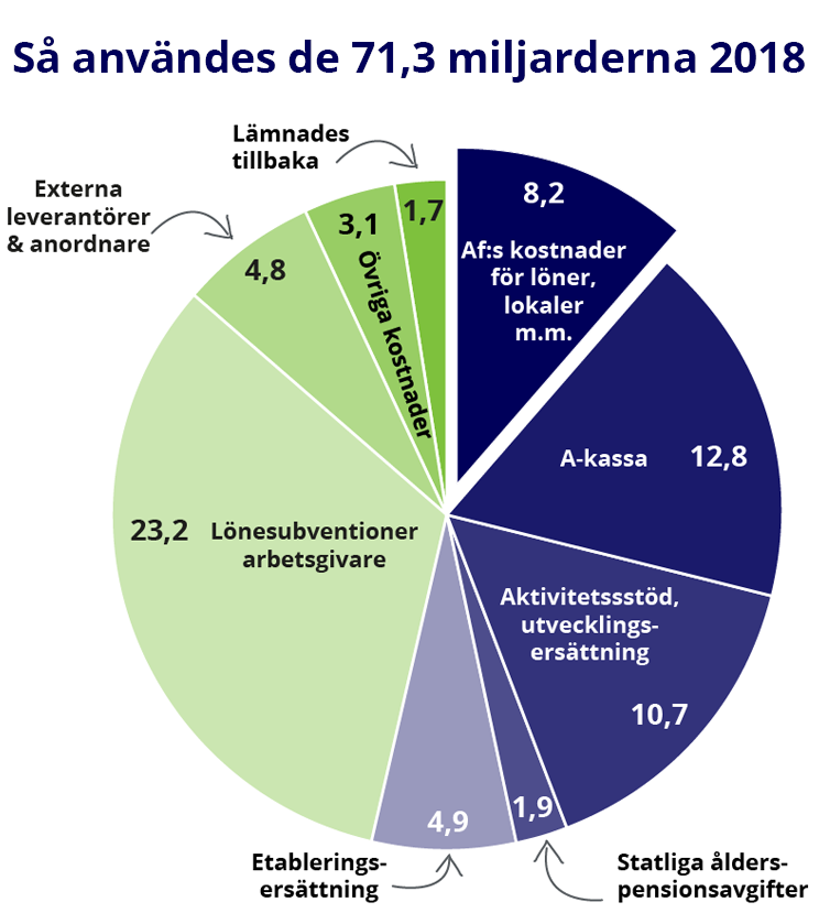 Arbetsförmedlingens användning av budgeten för 2018